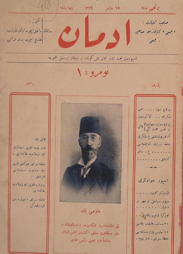 İdman dergisinin 28 Mayıs 1913 tarihli ilk sayısının kapağı.